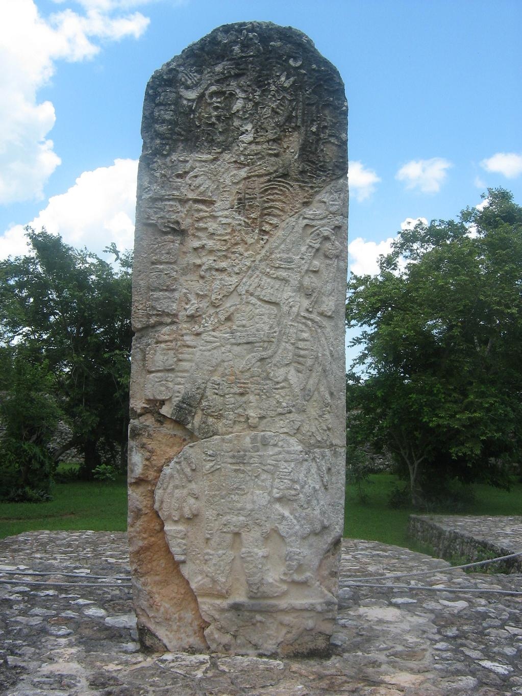 Estela en ek´Balam